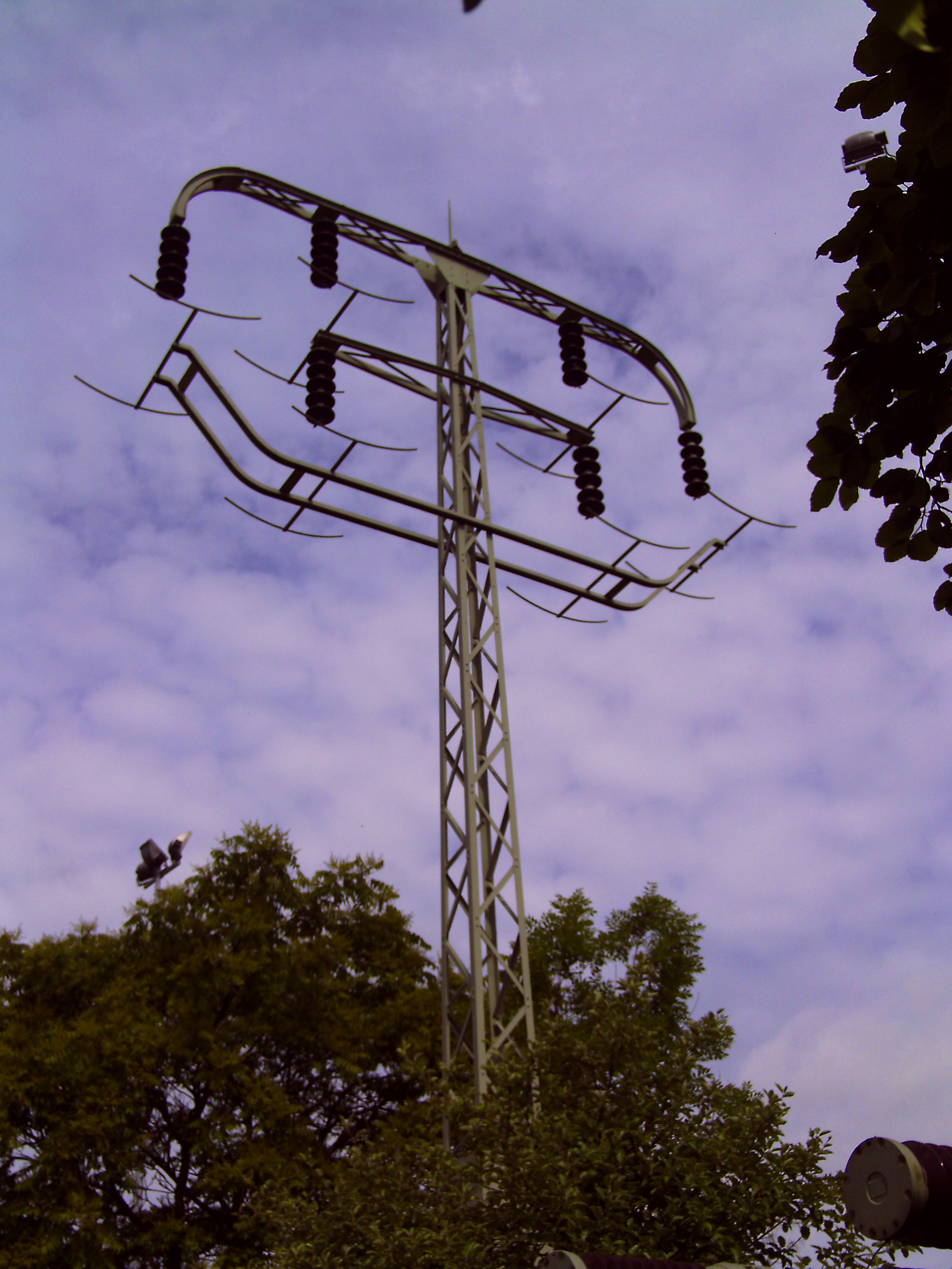 Denkmalgeschützter Strommast, Walther-Pauer-Straße in Cottbus.